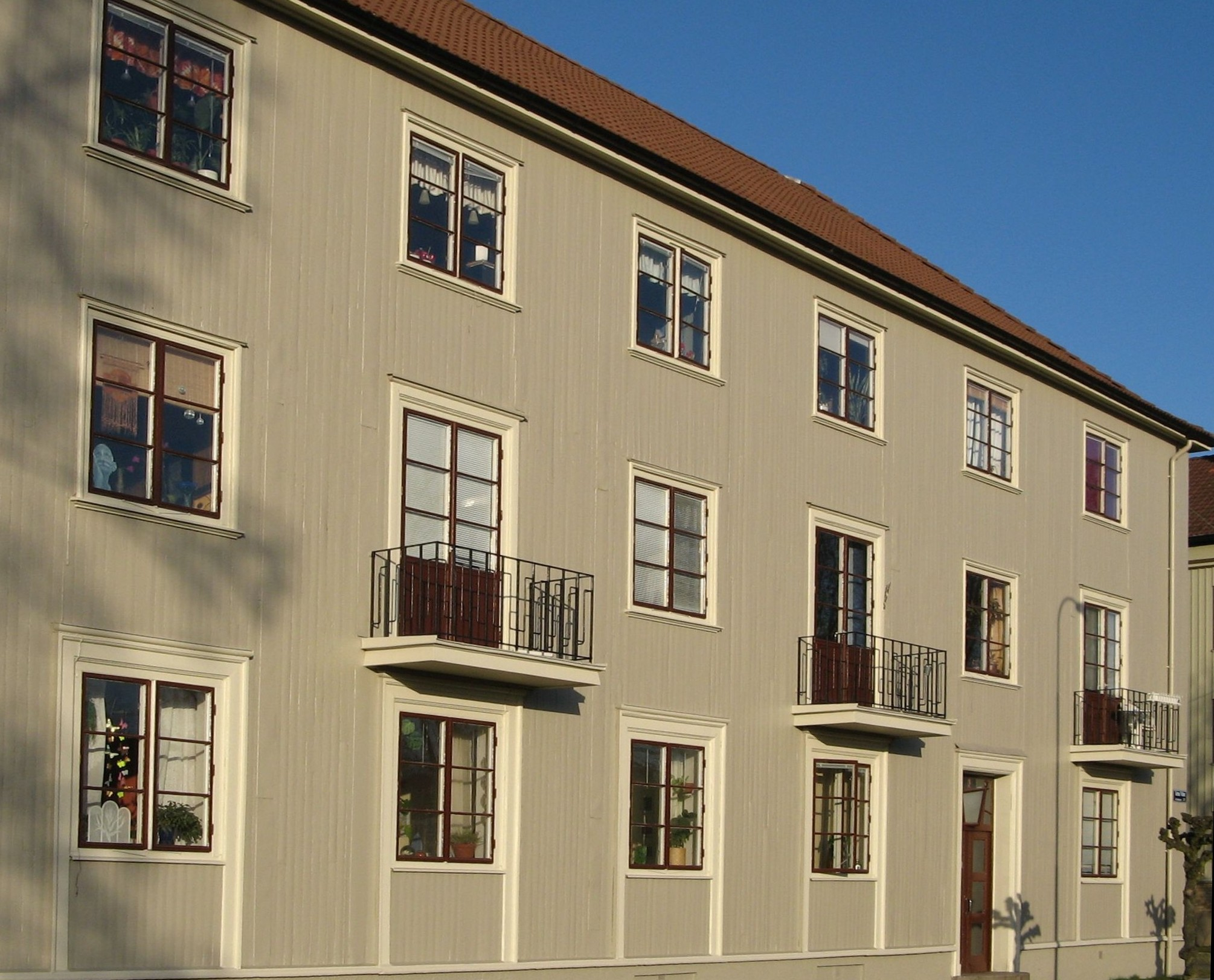 Photo: Thomas Höjemo. Kvarteret Maskrosen, Gröna vallen, Göteborg. built 1928-1934.